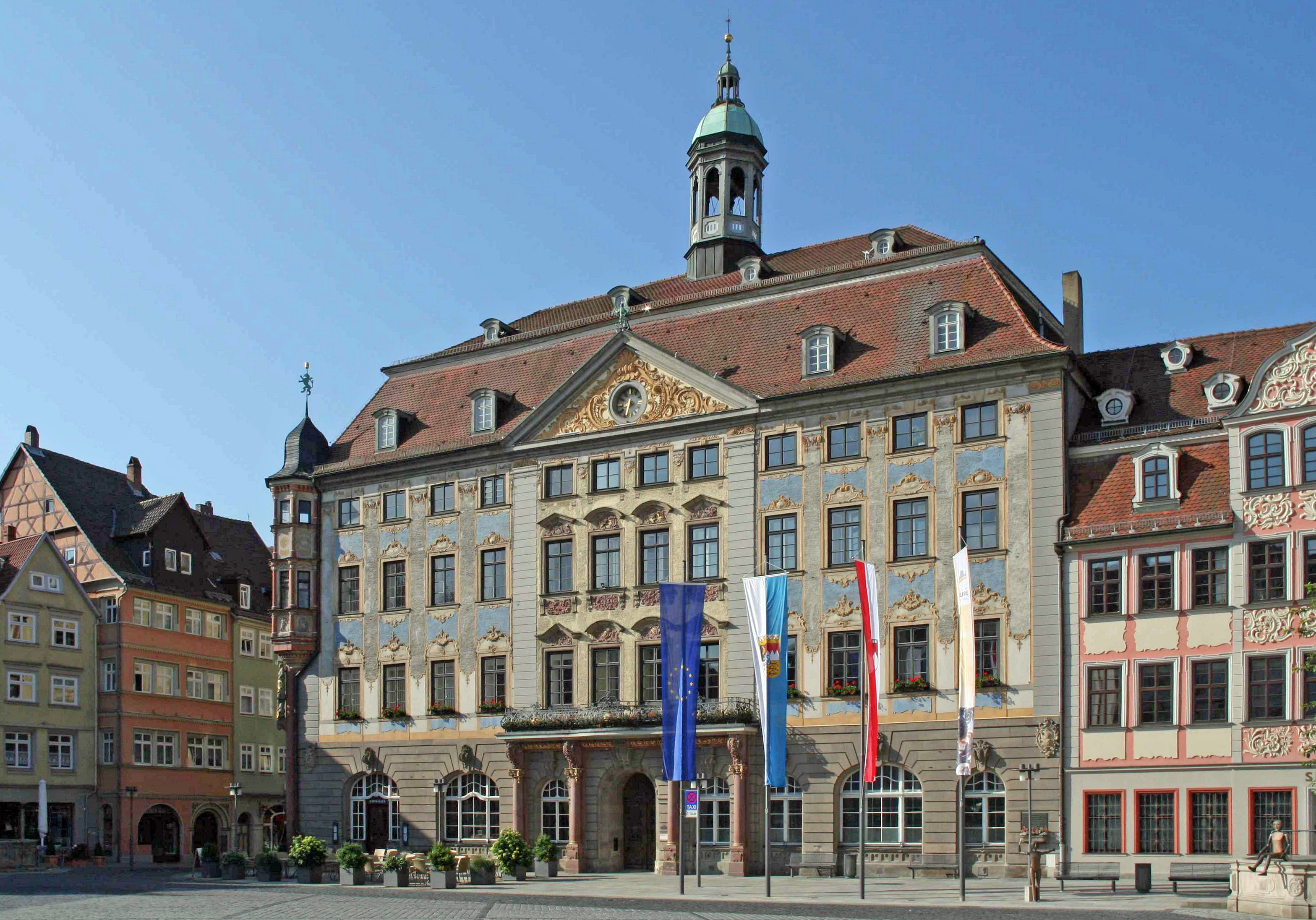 Rathaus, Coburg (Germany)